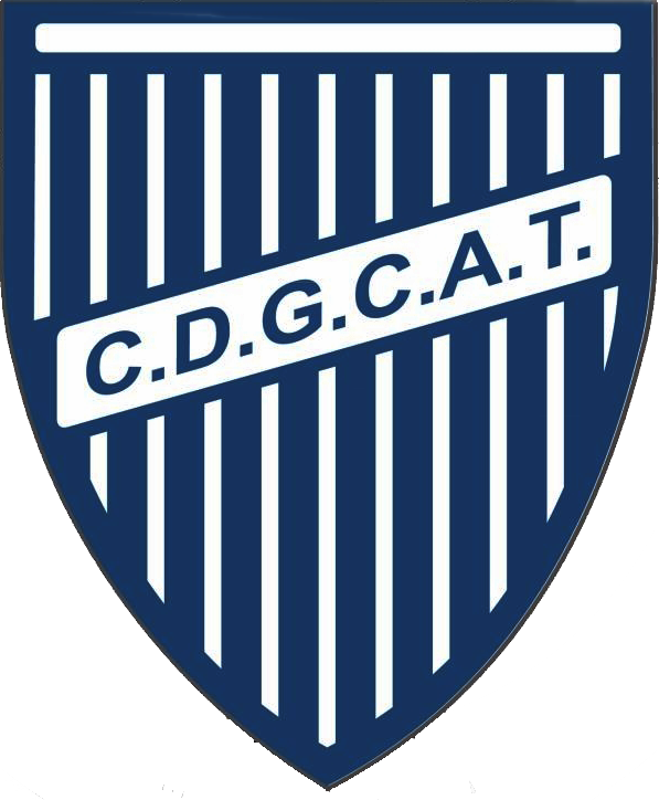 Escudo del Club Deportivo Godoy Cruz Antonio Tomba.